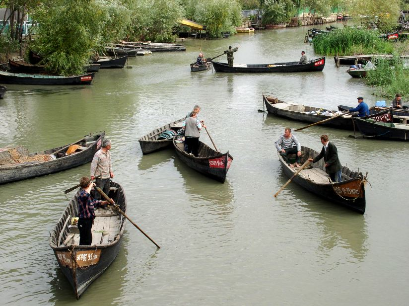 Вилкове: Білгородський канал у місті Вилкове